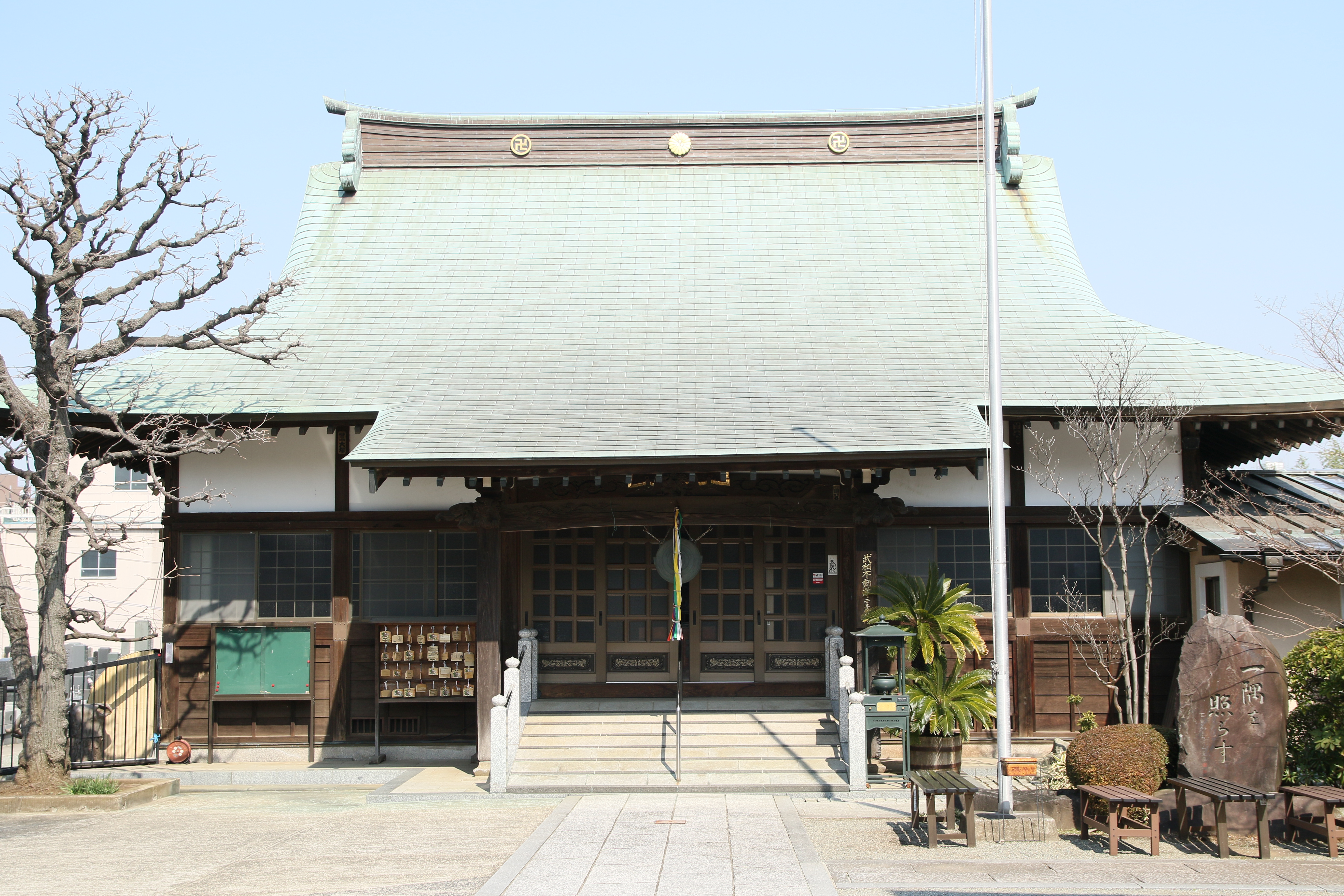 泉福寺(川崎市宮前区)本堂